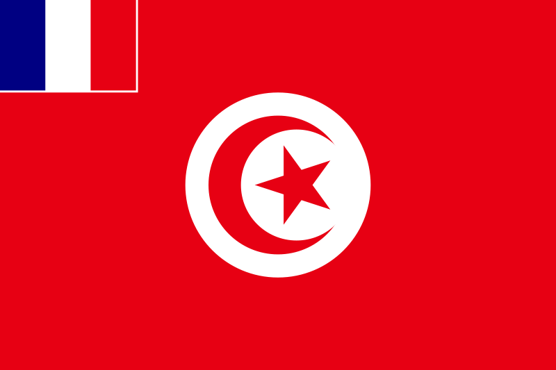 Drapeau utilisé en Tunisie par quelques unités militaires françaises (sous le protectorat français)